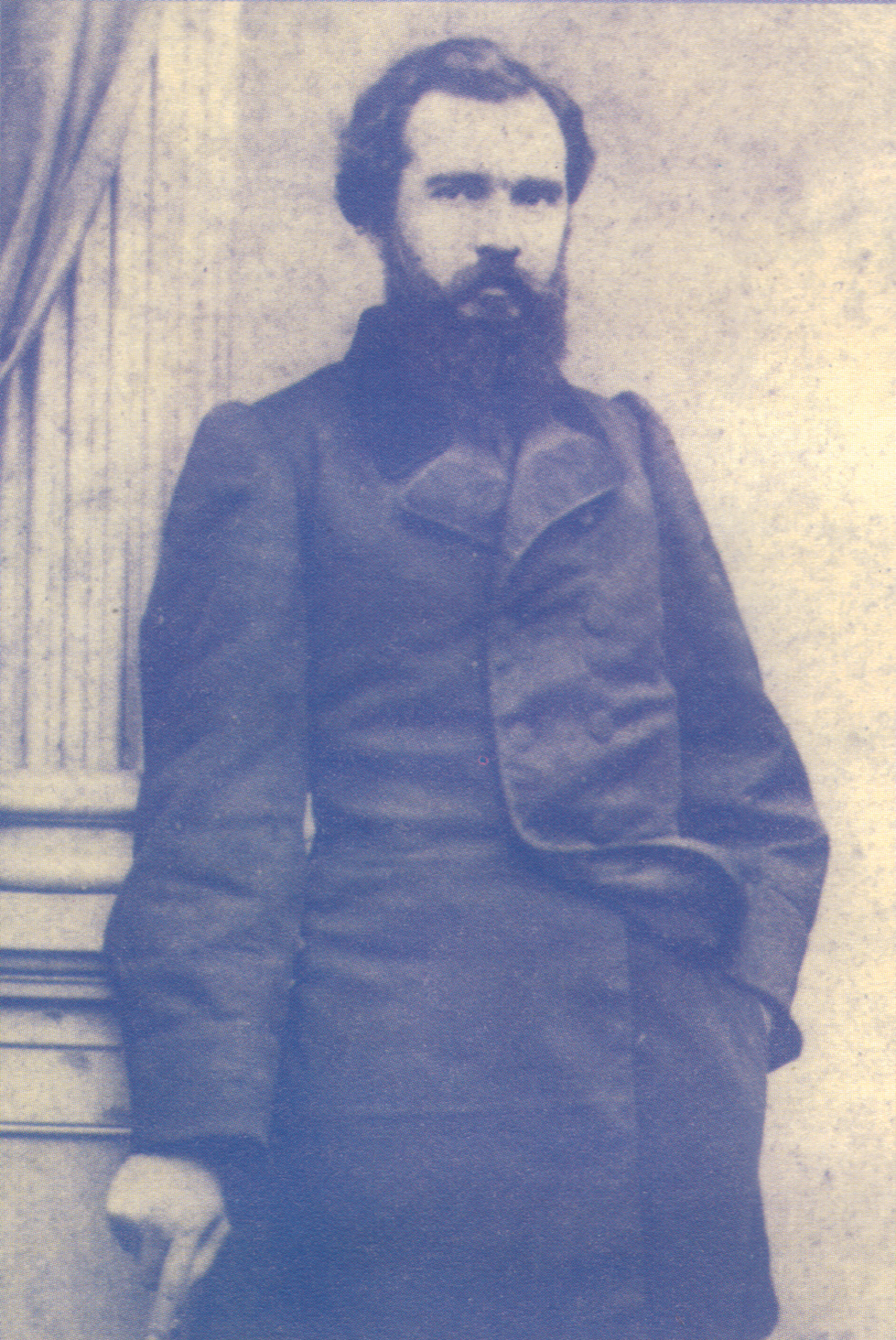 Francisco Antonino Vidal (1827 – 1889), presidente del Uruguay entre 1880 y 1882, y en 1886.